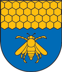 Το έμβλημα της πόλης.